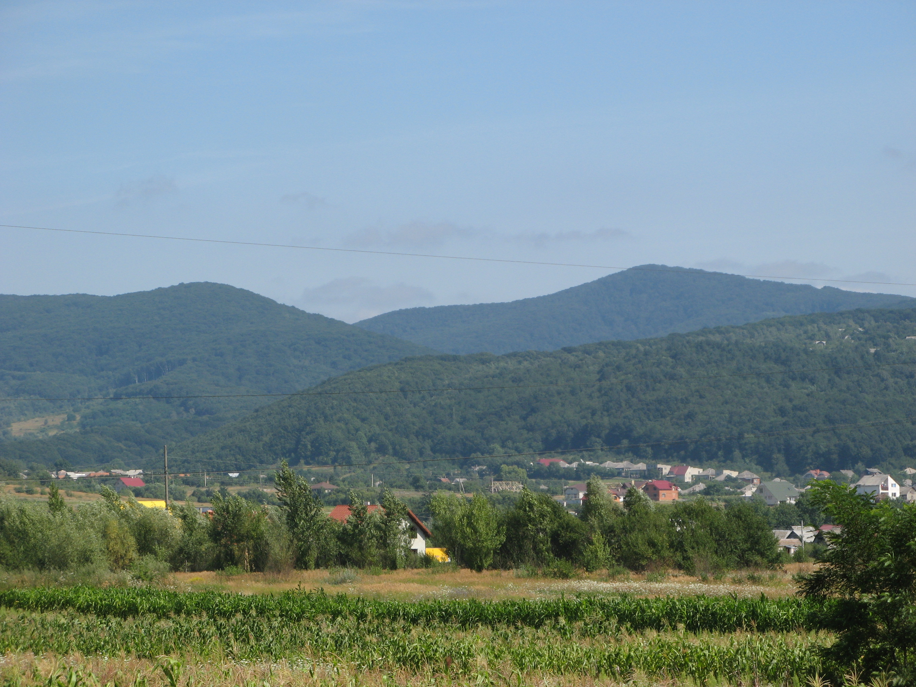 Гори масиву Вигорлат і село Кам'яниця (Ужгородський район, Закарпатська обл.)